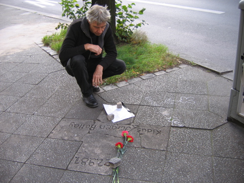 Am Gedenkort für Klaus-Jürgen Rattay in der Potsdamer Straße in Berlin.